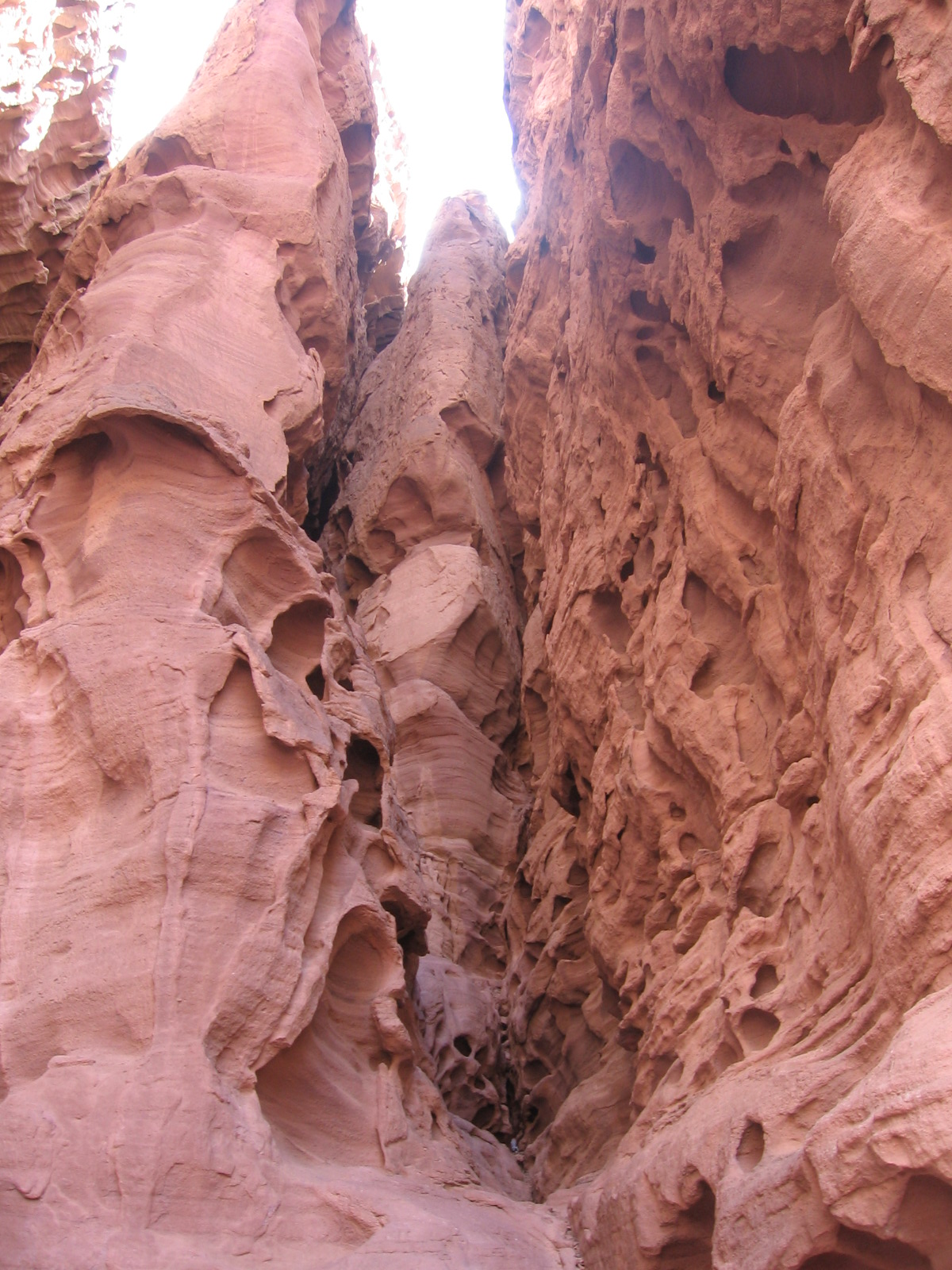 Timna Park, Negev, Israel